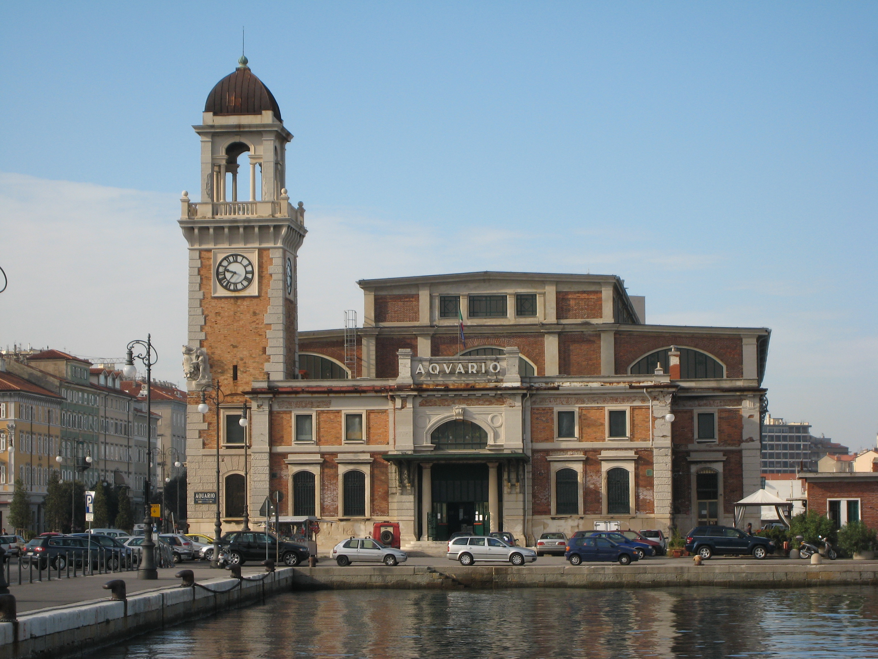 Acquario marino di Trieste